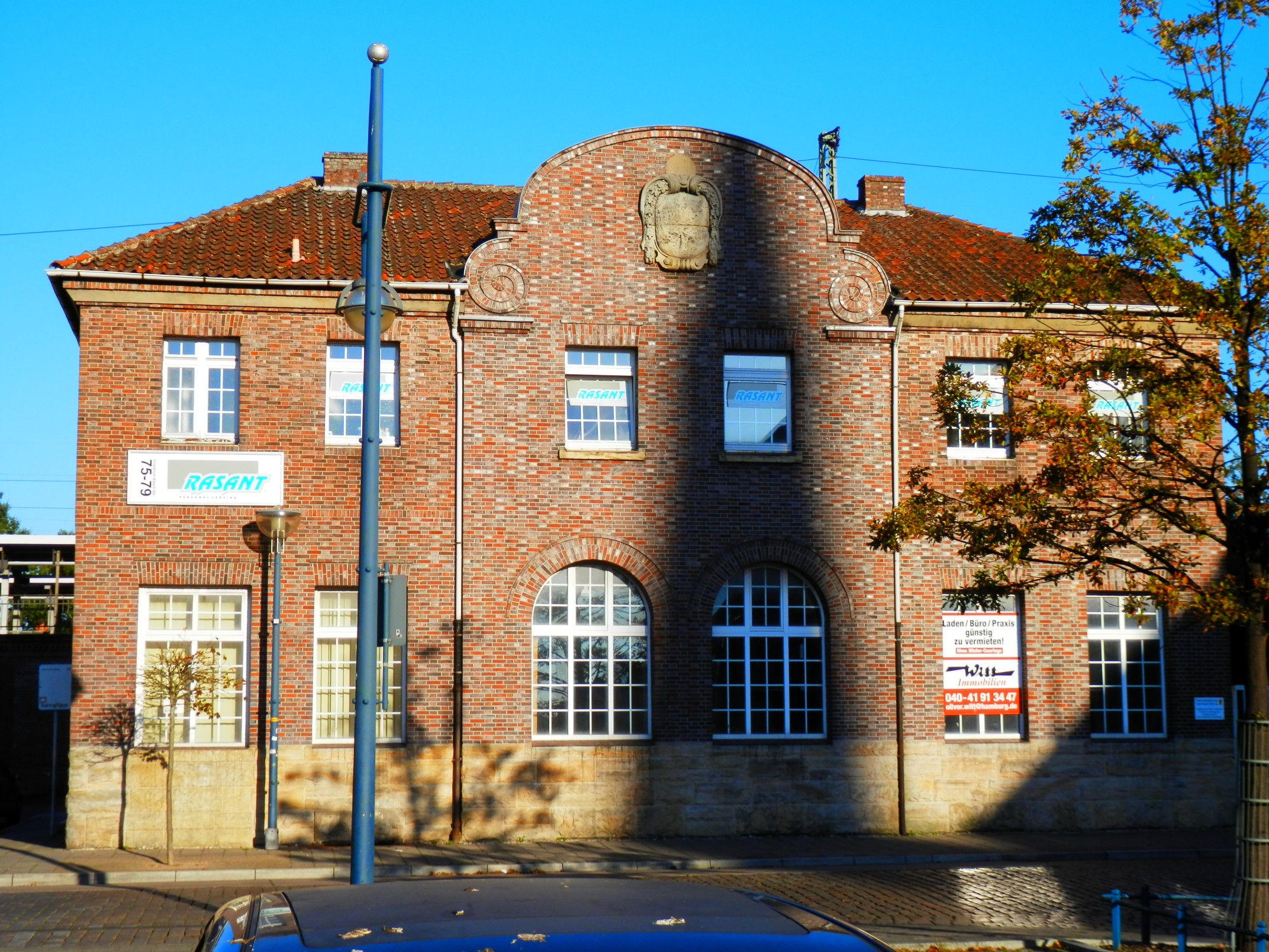 Kaiserliches Postamt, Alte Post, Bahnpostamt in Bremerhaven, Friedrich-Ebert-Straße 75Das abgebildete Objekt ist ein geschütztes Kulturdenkmal in der Freien Hansestadt Bremen, mit der Nr. 3334 beim Landesamt für Denkmalpflege registriert.